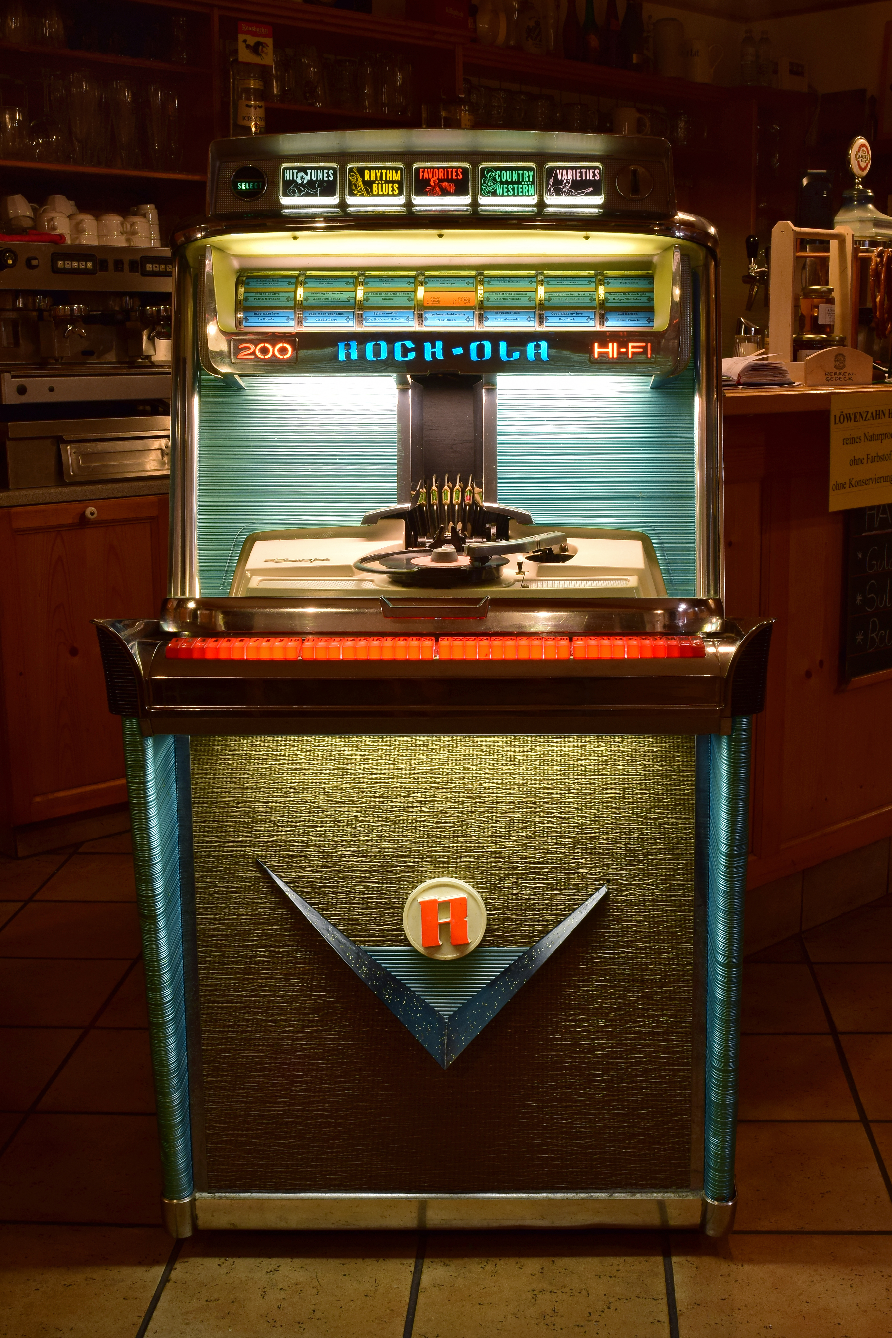 Noch funktionierender Rock-ola-Automat im Gasthaus Reiter[1] (Windgasse 8) in Haslach an der Mühl.